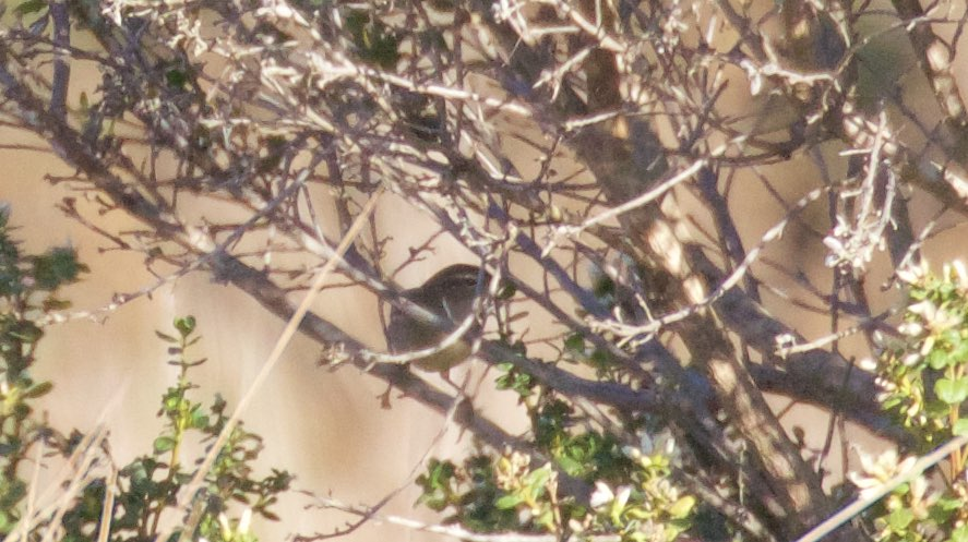 Dusky Warbler | Redwood Creek | Muir Woods | CA | 2015-10-19at09-55-411